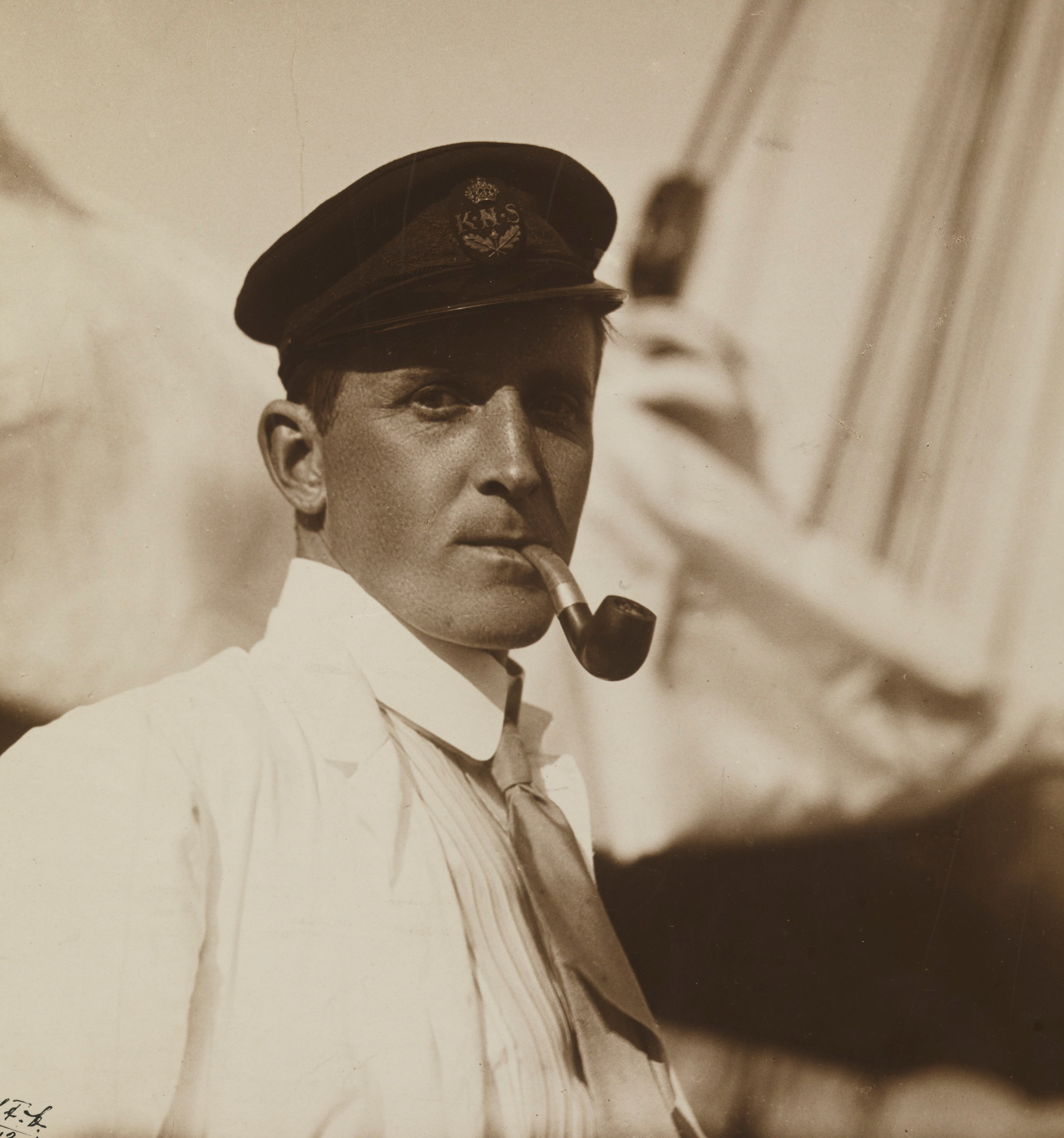 Bjørn Helland-Hansen, professor i oseanografi, om bord i båten Armauer Hansen på en forskningsferd. Depicted person: Helland-Hansen, Bjørn (1877-1957) Depicted place: Atlanterhavet